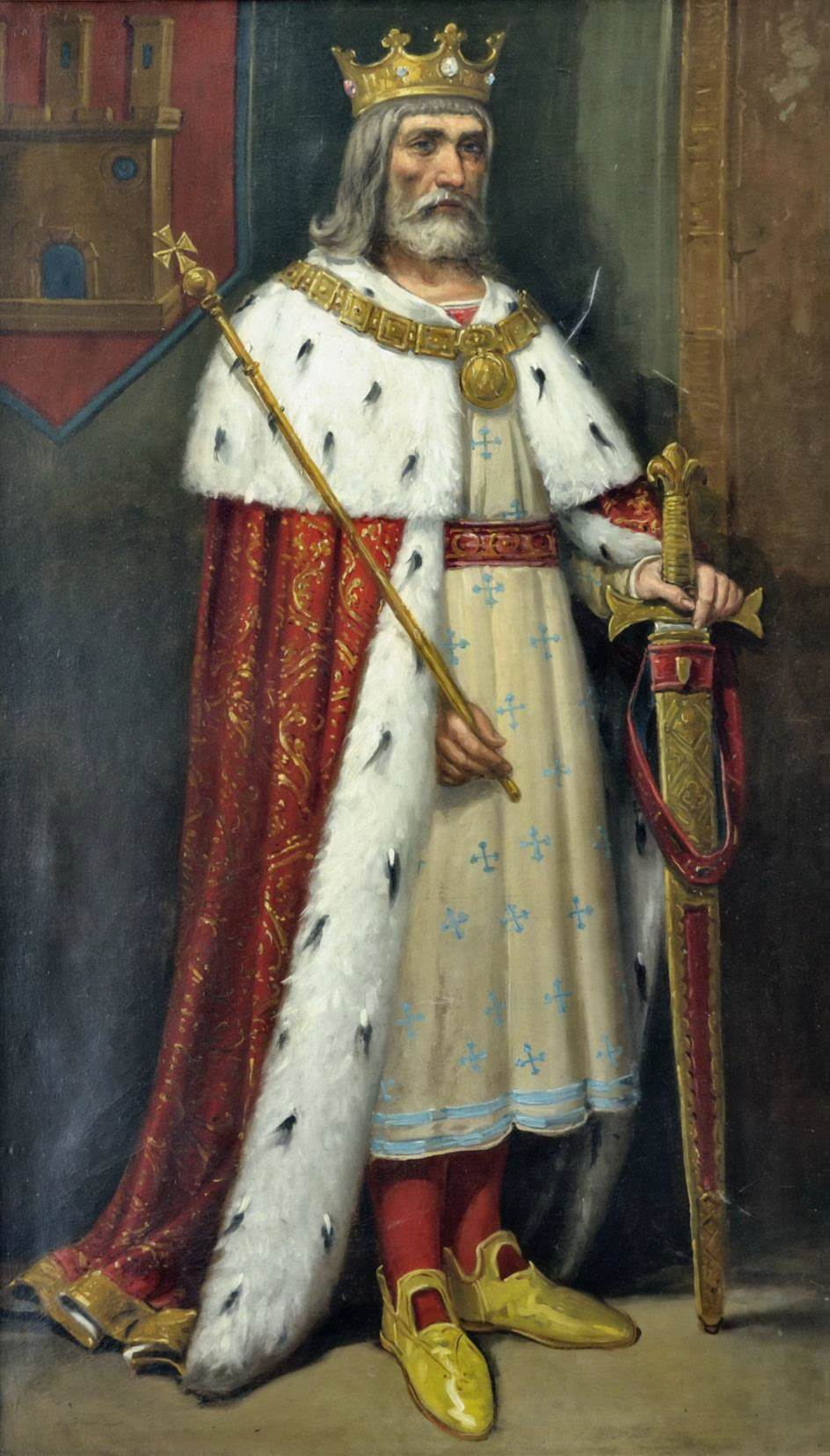 Retrato imaginario del rey Alfonso VIII de Castilla (1155-1214). Fue hijo del rey Sancho III de Castilla y de la reina Blanca Garcés de Pamplona.Conquistó la ciudad de Cuenca en 1177 y derrotó a los musulmanes en la batalla de las Navas de Tolosa, librada en 1212 y una de las más cruciales de la Reconquista.